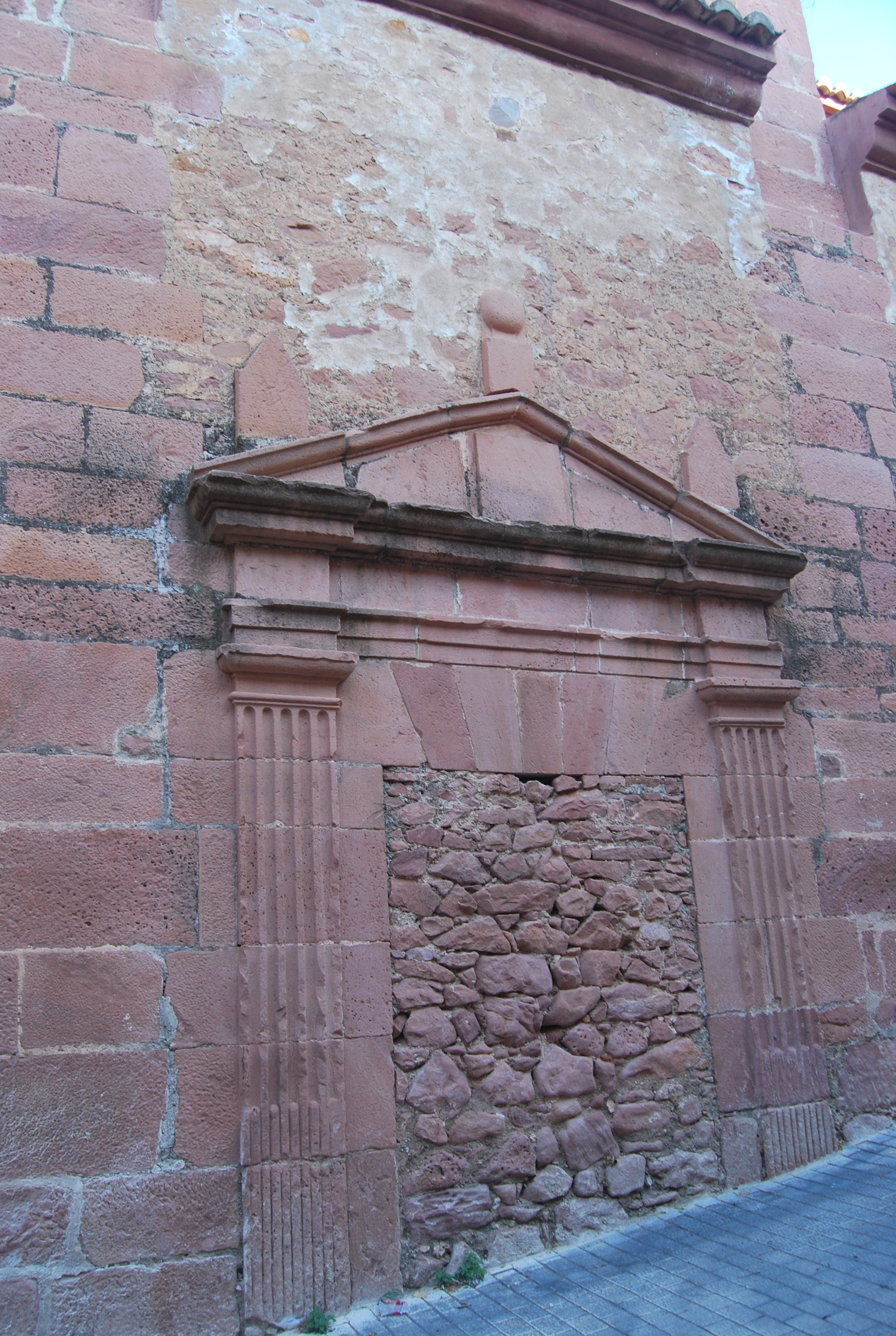 Església de l'Assumpció, Vilafamés 05.128-004.